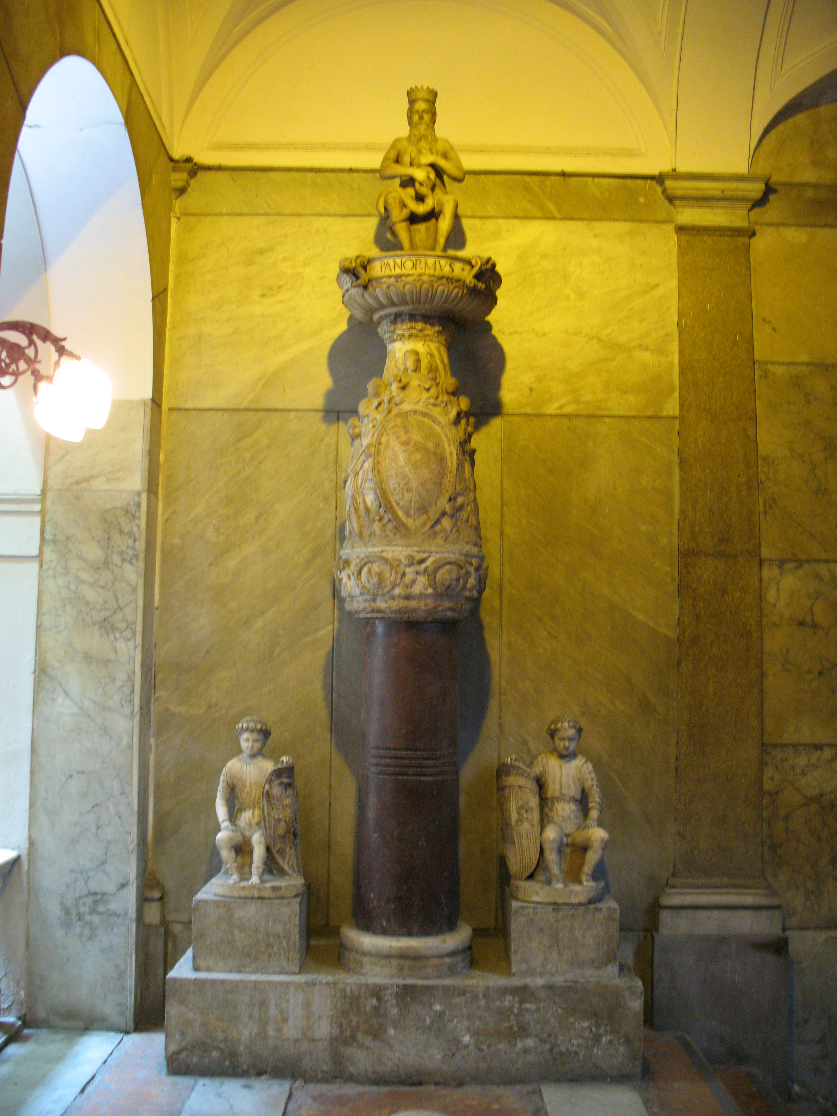 Palazzo Pretorio di Palermo, statua del Genio di Palermo (Panormus, Panormvs)